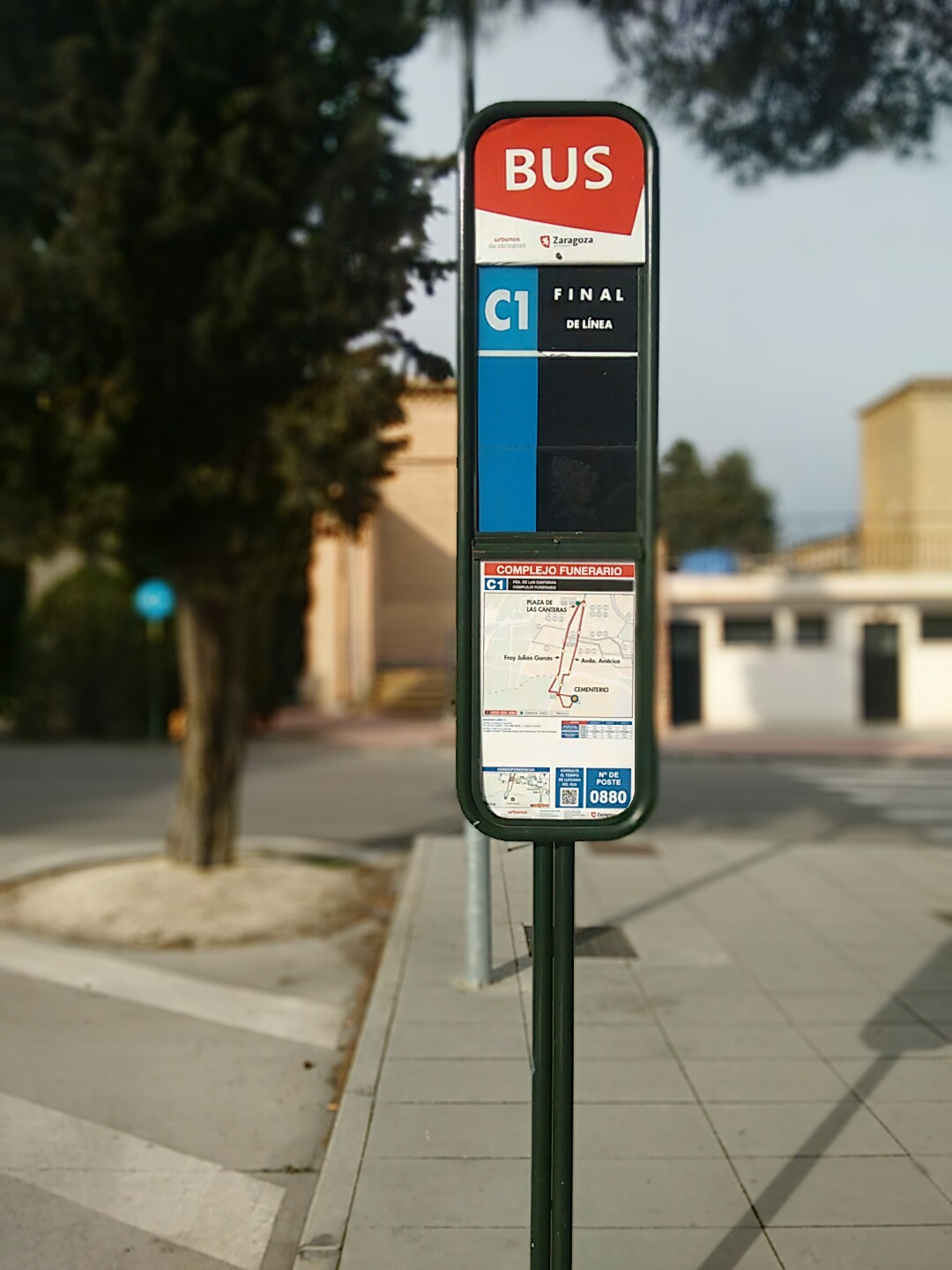 Parada final de la línea C1 de Auzsa, en el Complejo Funerario (Cementerio) de Zaragoza (España).